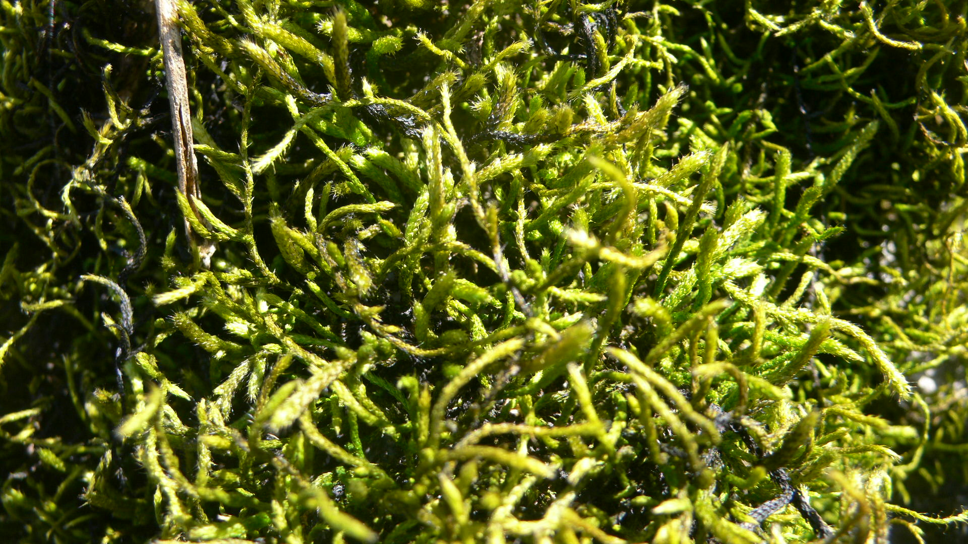 Loài rêu Meteorium subpolytrichum (Rêu thô màu nâu nhiều lông)